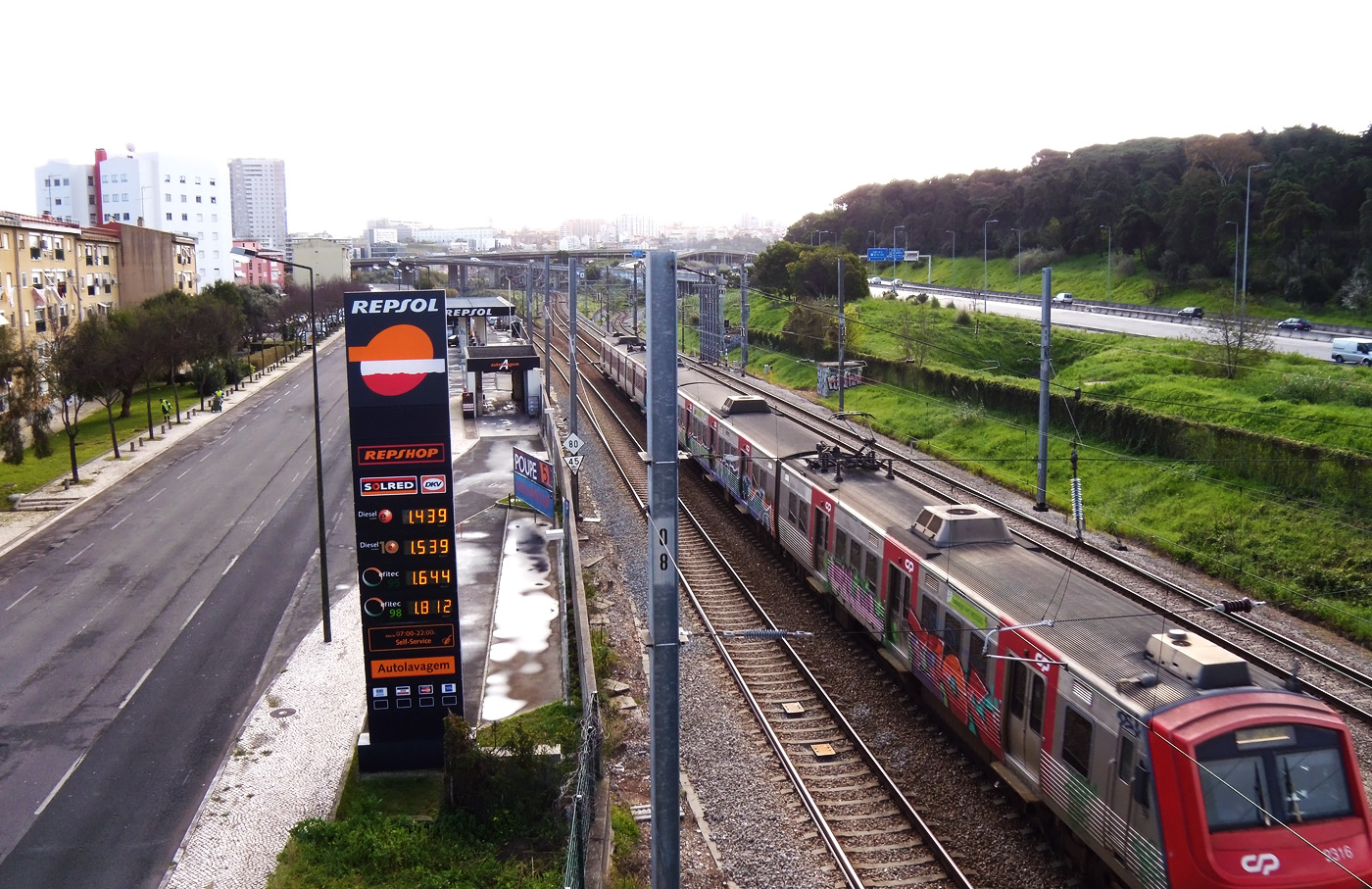 Электричка